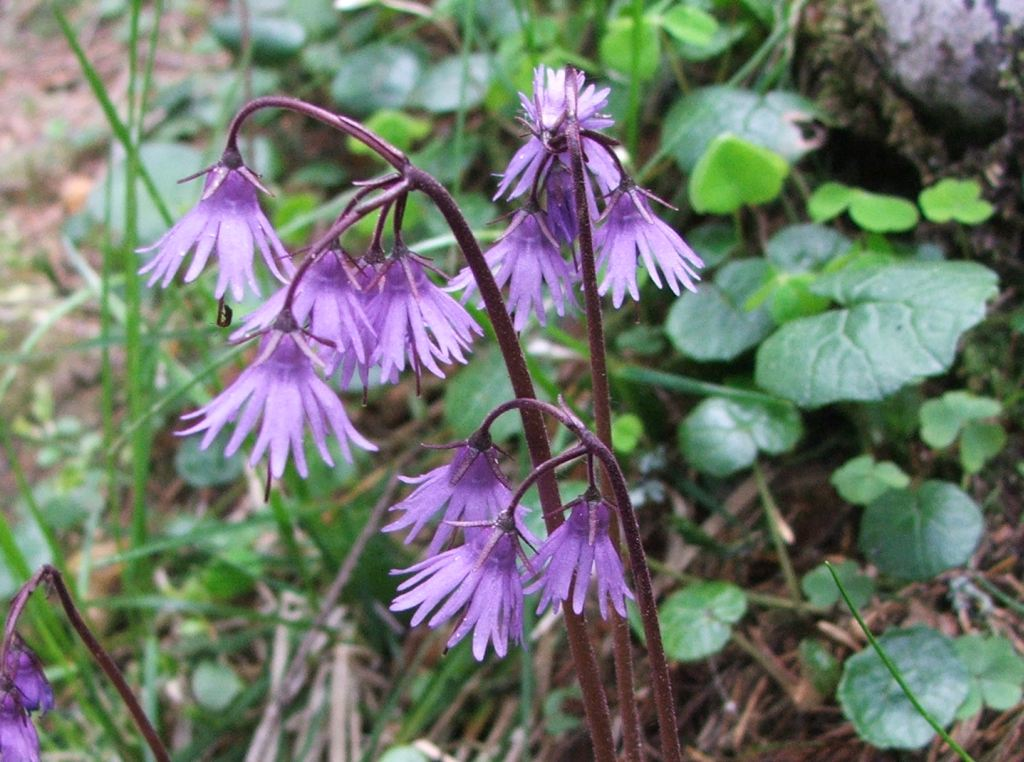 Soldanella carpatica (pl. urdzik karpacki), habitat:Tatra Mountains - Dolina Kościeliska